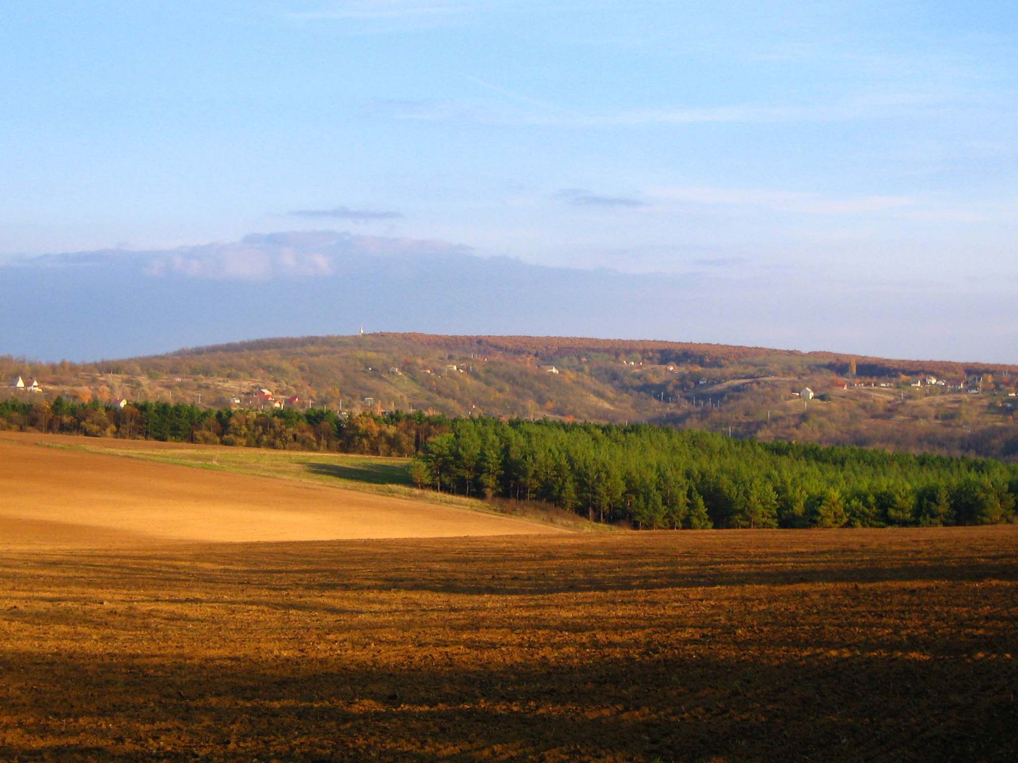 View of the Gödöllő Hills, A Gödöllői-dombság látképe